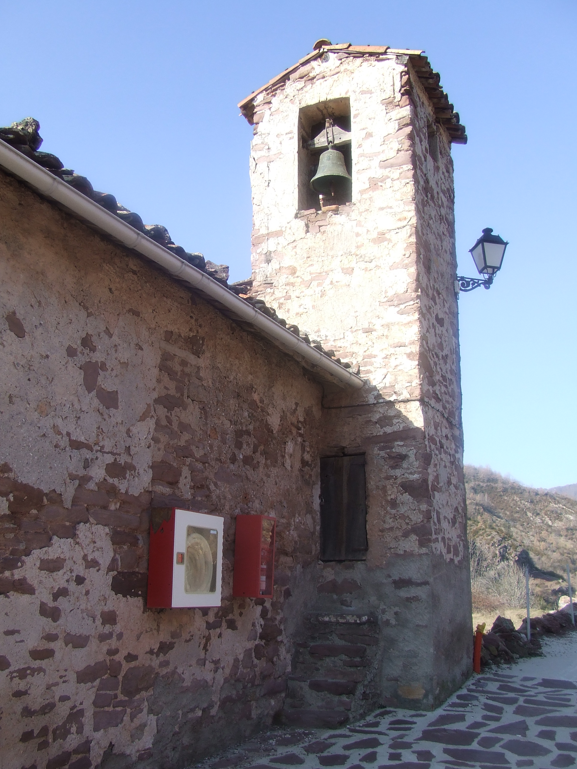 Sant Pere de Castell-estaó (la Pobleta de Bellveí, la Torre de Cabdella, Pallars Jussà)